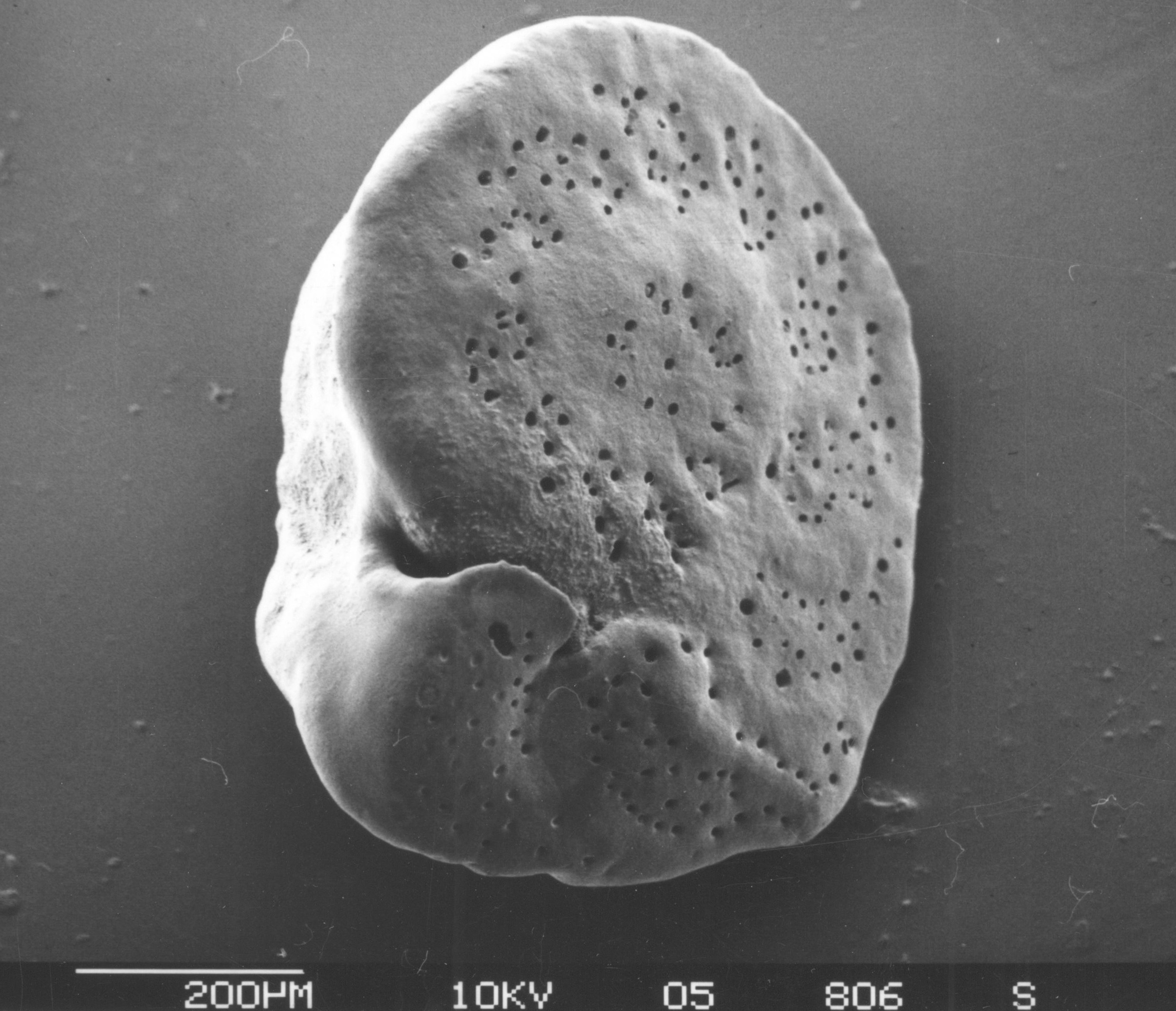 Foraminifera Cibicides lobatulus